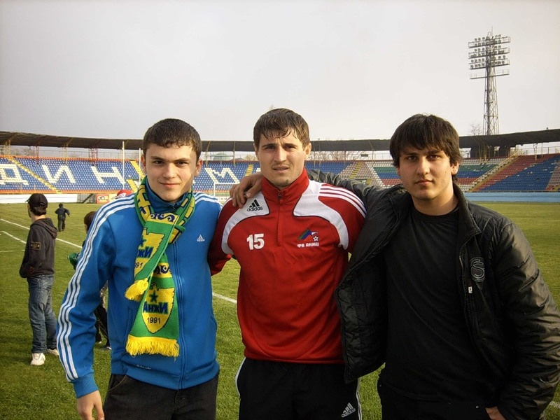 Николай ЖосанRomână: Nicolai Josan (în centru)